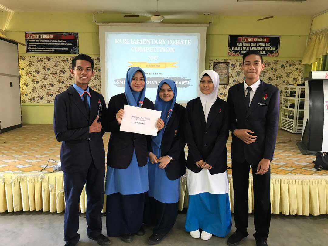 STEM